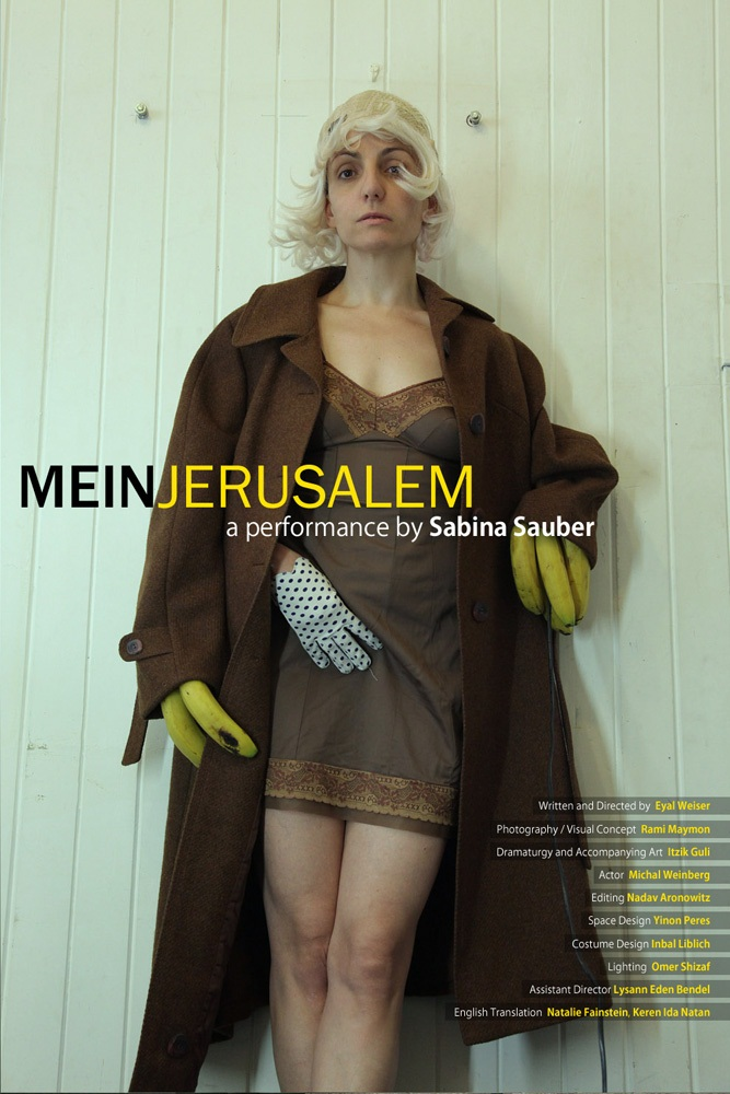 מיכל ויינברג בהצגה מיין ג'רוזלם